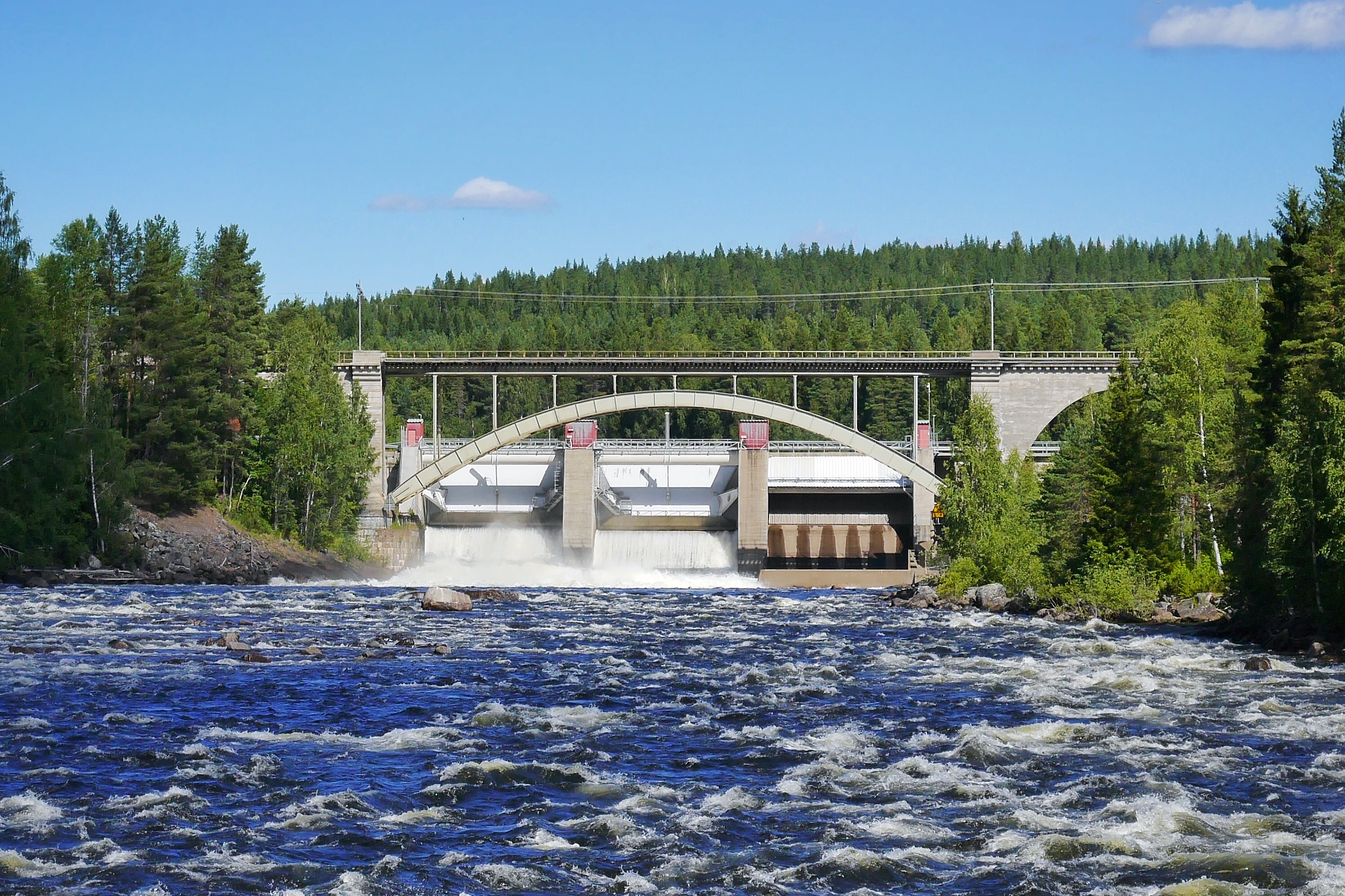 Järnvägsbron över Piteälven vid Sikfors (Sikfors 100:8). Bron byggdes 1911-1912 och togs i bruk 1914. Brons hela längd är 155 meter. Den har fyra spann och spannens spännvidd är 15+58,3+20+24 meter. Alldeles bakom bron syns dammen tillhörande Sikfors kraftstation. Detta är ett foto av en svensk skyddad bebyggelse, anläggning nummer 21300000024811 i RAÄ:s bebyggelseregister (BBR).